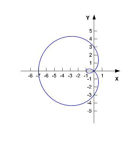 (Original text: limacon van r(a)=3-4cos(a))